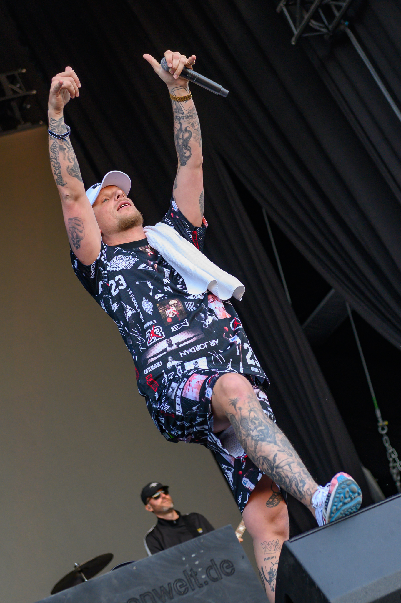 ARGO-Konzerte,Beck's Park Stage,Bonez MC & RAF Camora,Konzert,Livekonzert,Livemusik,Musik,RiP,Rock im Park 2019